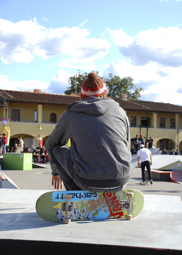 Skateboarder, Festival della Creatività 2009, Florence, Italy.